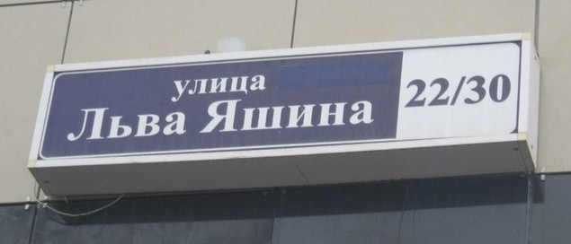 Аншлаг на доме № 22 по улице Льва Яшина в Грозном